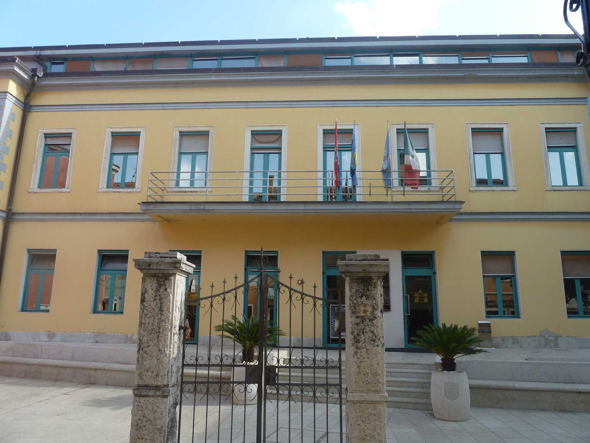 Sídlo starostu v Umagu